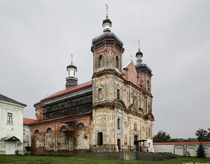 Юравіцкі кляштар езуітаў